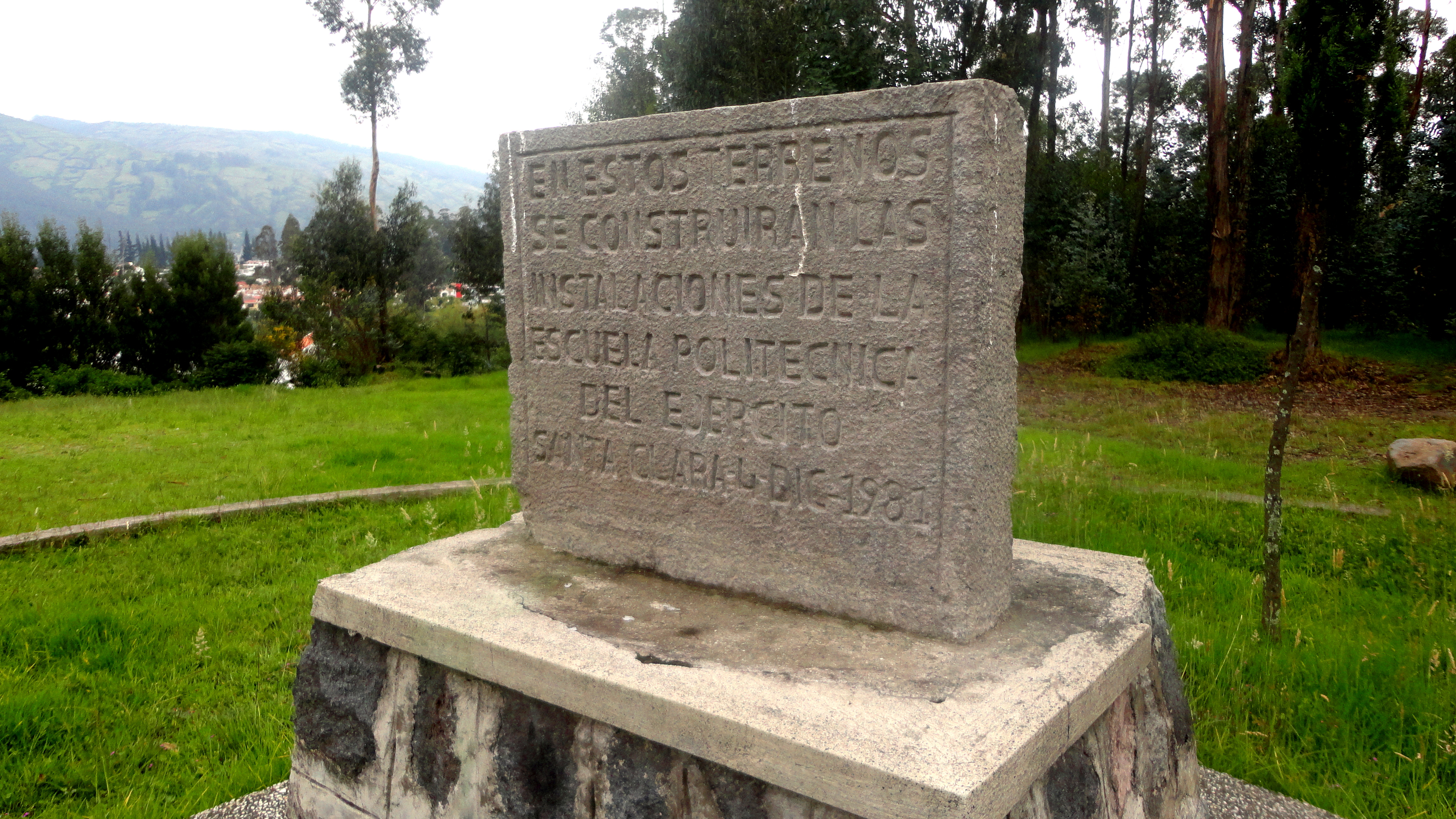 Monumento antes de la contrucción de la universidad